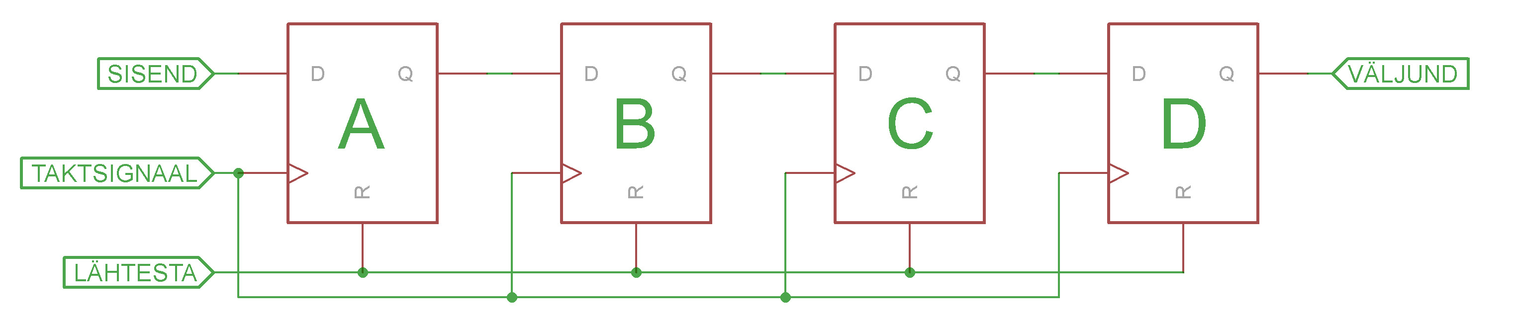 D-trigeritest koostatud järjestiksisend järjestikväljund nihkeregister.